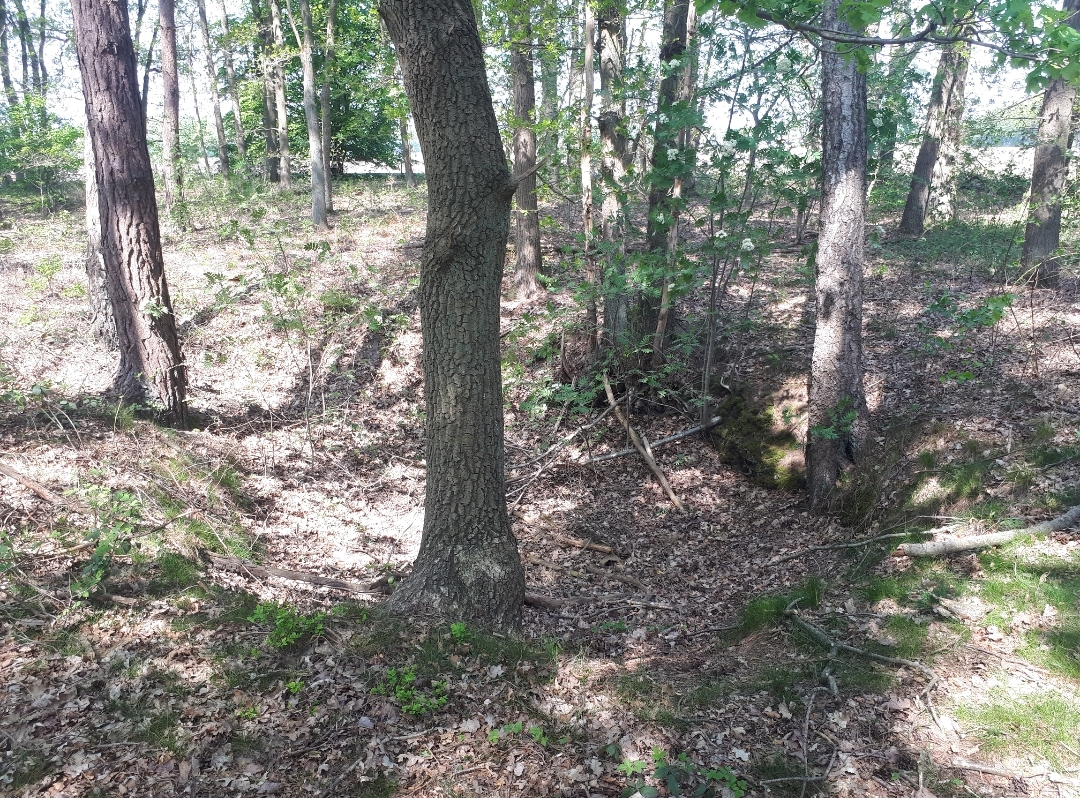 Oude drenkplaats van de voormalige Herberg de Pan op de Cartierheide